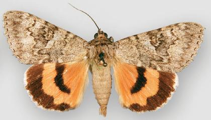 Catocala verecunda